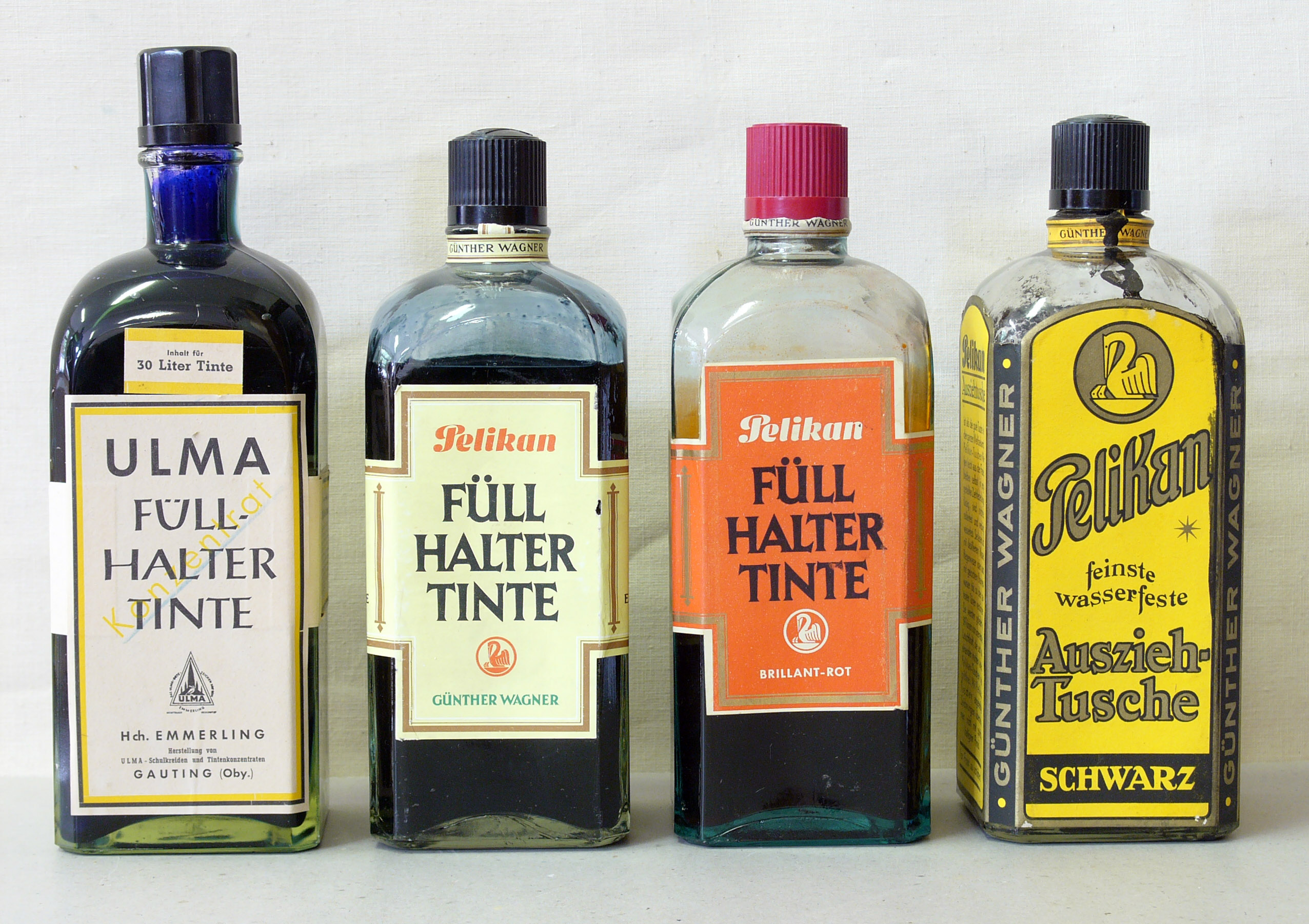 Ink